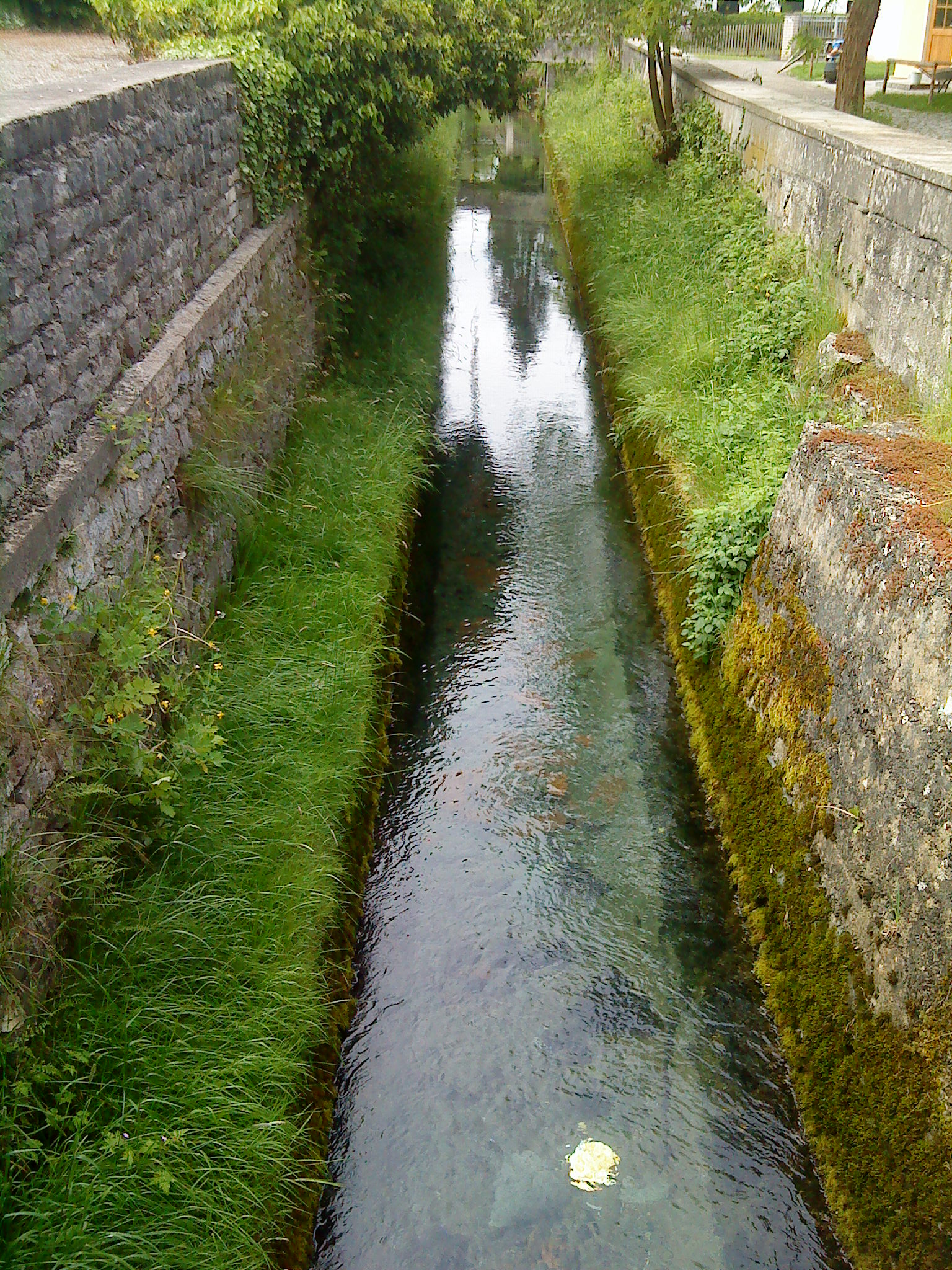 Der Hüttenbach in Obereichstätt